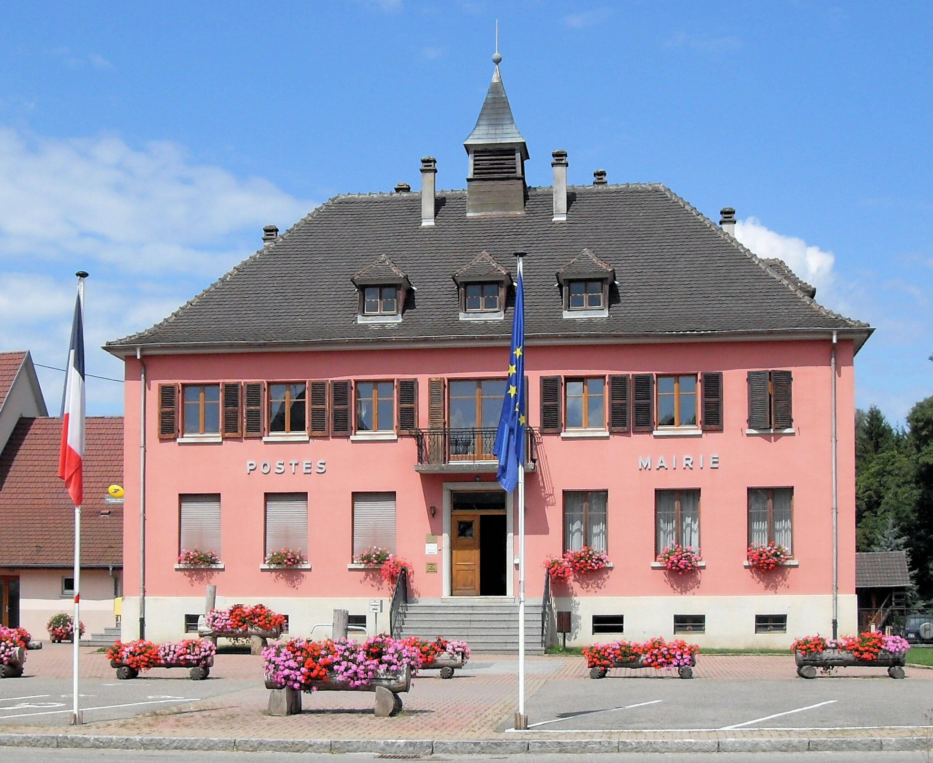 La mairie et la poste de Durmenach